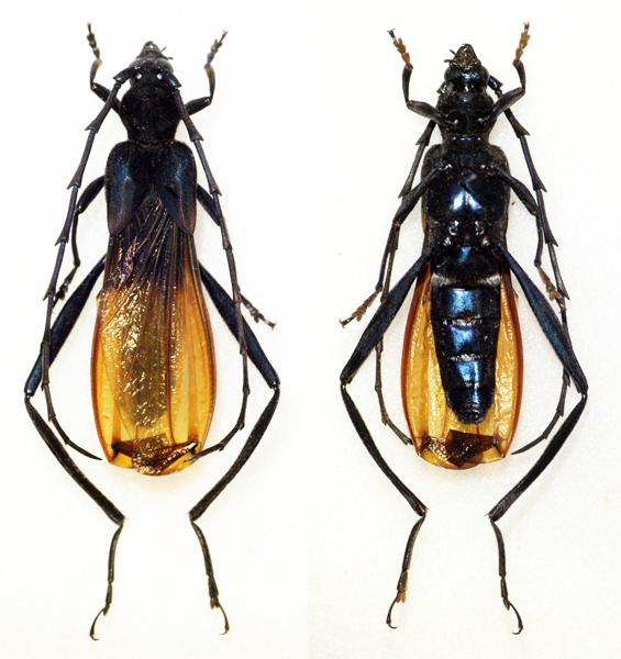 Hüdepohl,1987 Sex: Male Data: 08-2013 - Belance - Nueva Vizcaya - North Luzon - Philippines Size: ?